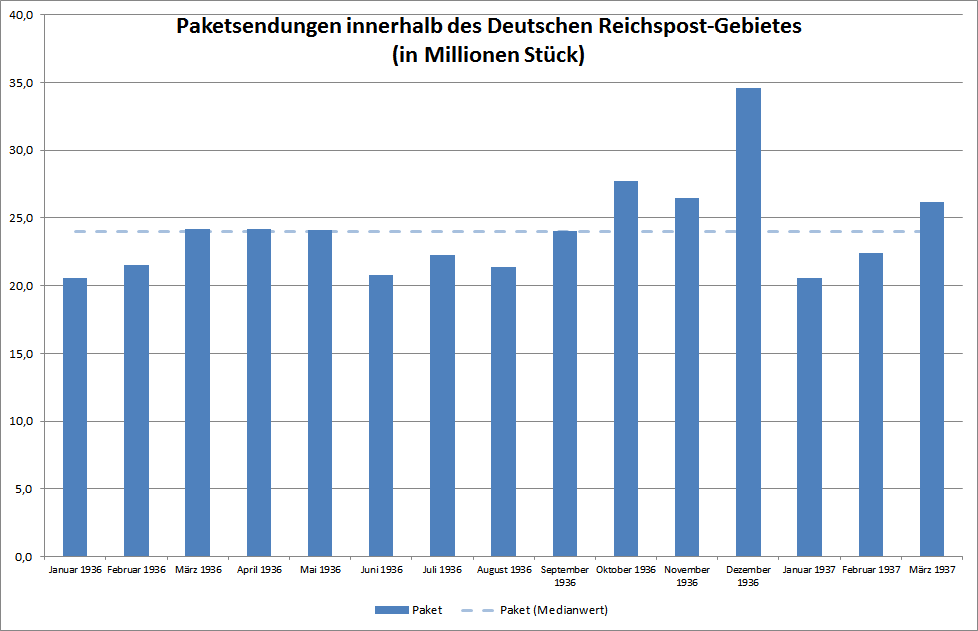 Datenquelle: »Zahlenspiegel der Deutschen Reichspost (1871 bis 1945)« Herausgegeben vom Bundesministerium für das Post- und Fernmeldewesen; bearbeitet von Oberpostrat a.D. Richard Maetz; Zweite, erweiterte und vervollständigte Auflage 1957. Gedruckt in der Bundesdruckerei; S. 34–44